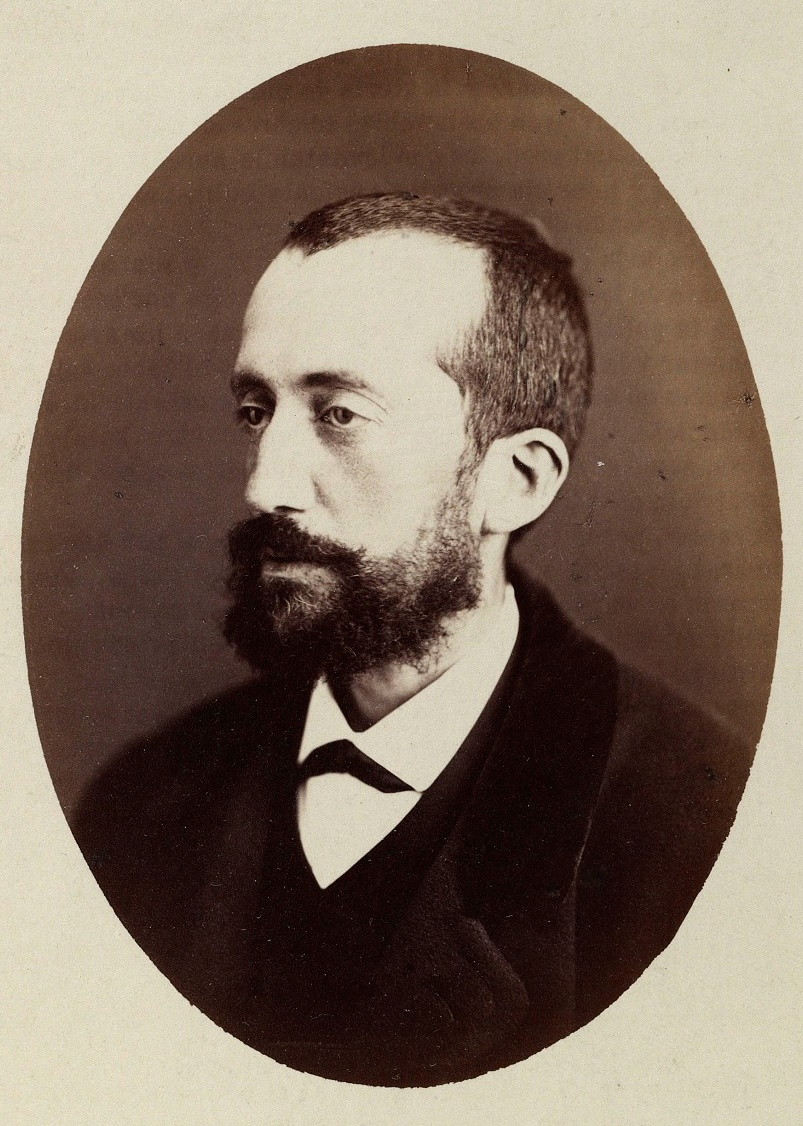 Florencio Janer. Almanaque de E. Juliá para 1873. Biblioteca Nacional de España.